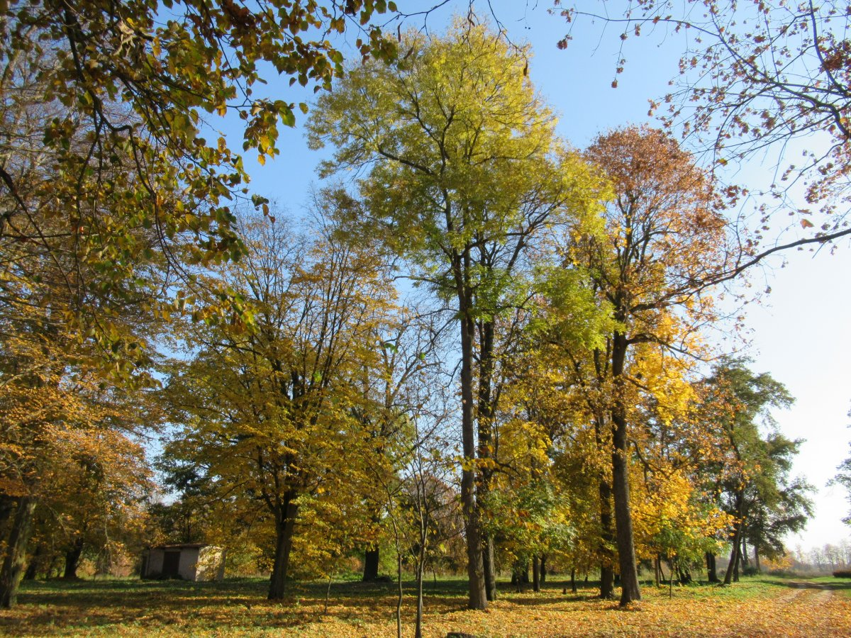 Флер’янова. Сядзіба Бохвіцаў